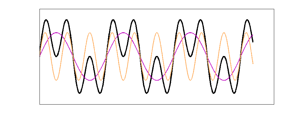 תרשים המתאר פירוק של פונקציה למרכיבי התדר שלה, על ידי התמרת פורייה. רישיון נוצר על ידי משתמש:אמיתושתוש